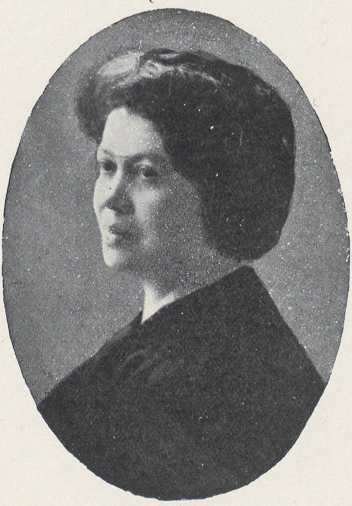 Brigida Walker Guerra, educadora chilena.